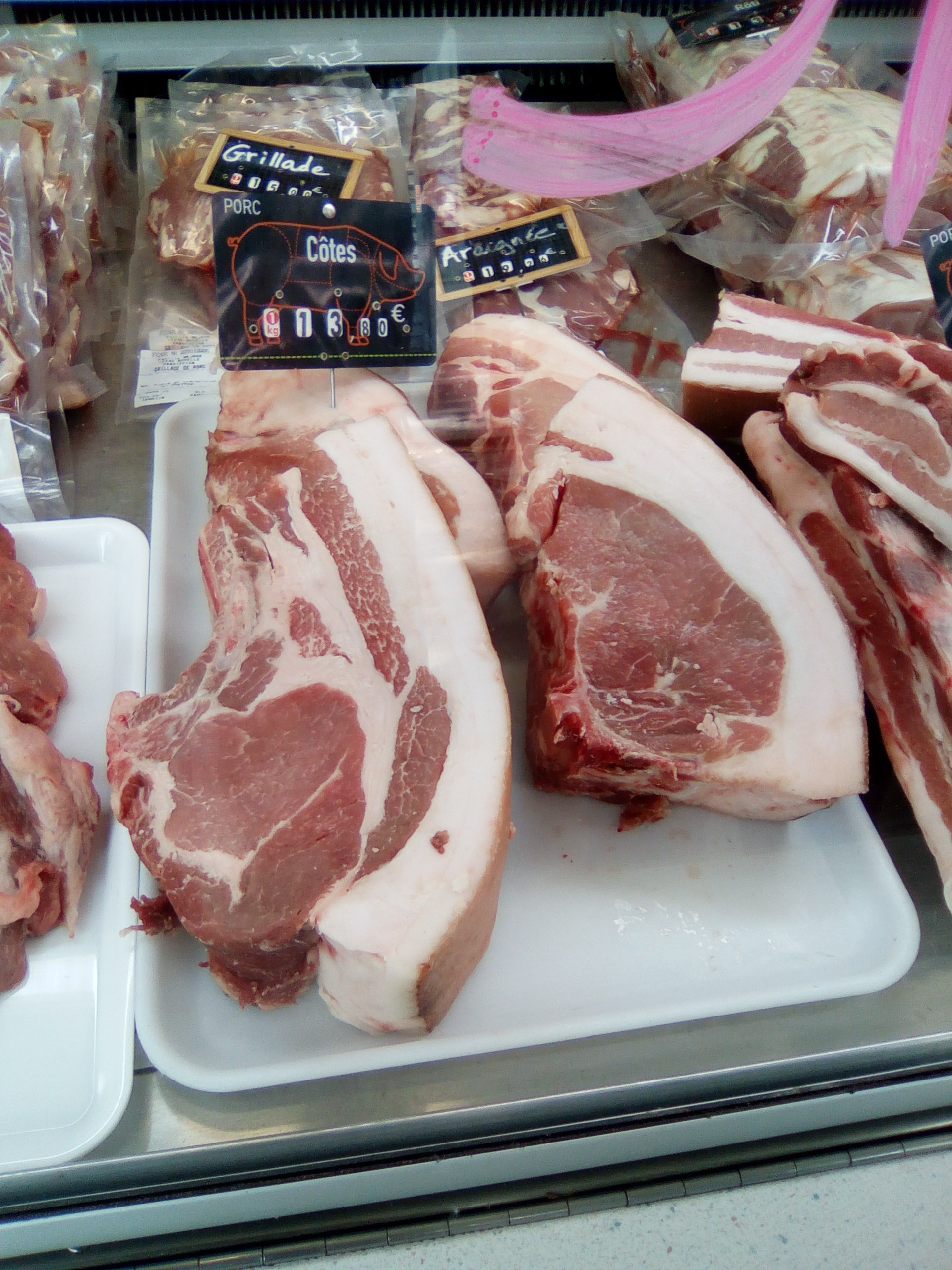 Marché des producteurs de pays, boulevard de Reuilly, Paris 12e.